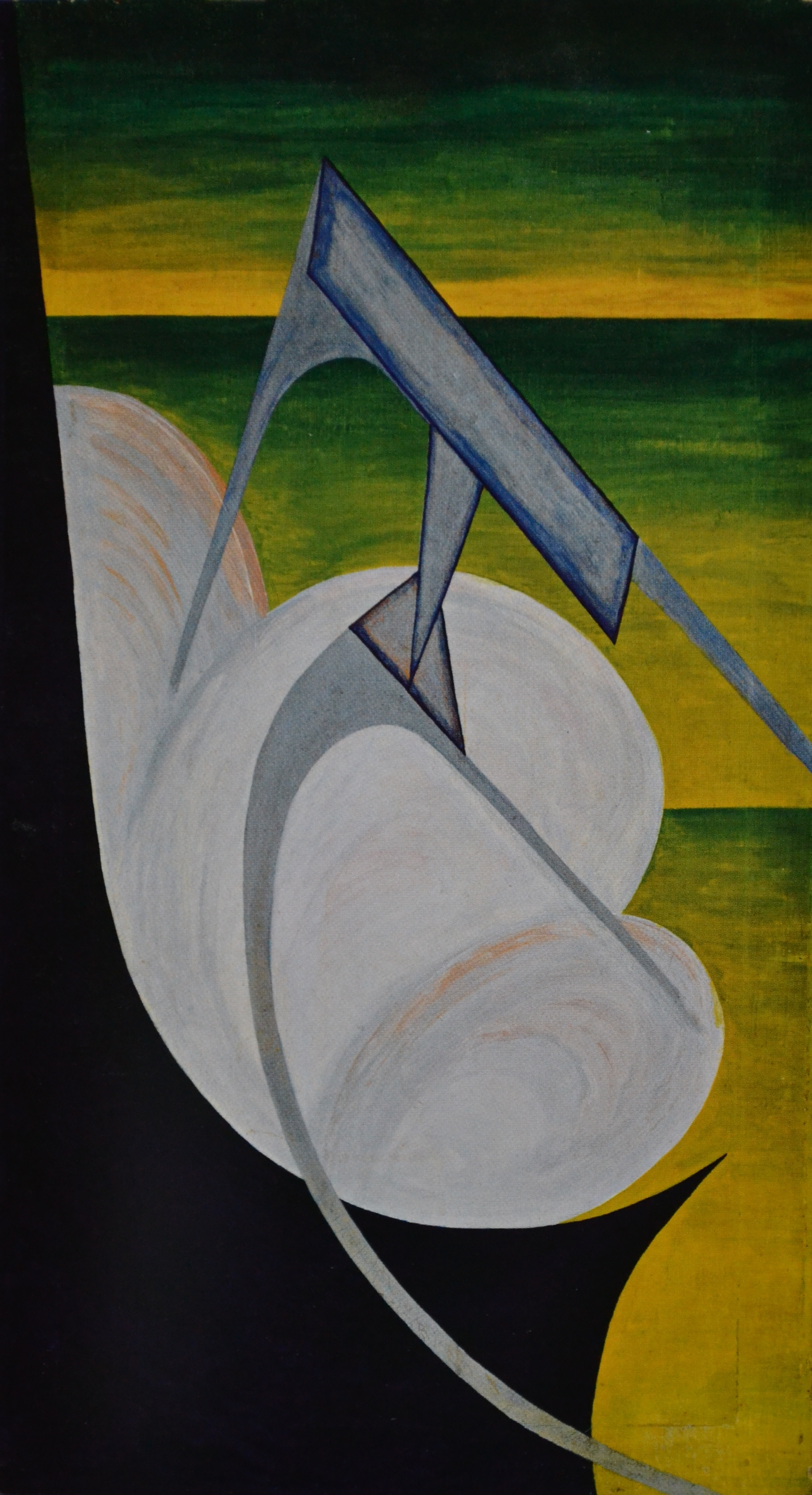 Teatro aereo futurista, 1922-26, Fedele Azari (1895-1930); olio su tela, 80 × 49 cm; Trento, Museo dell'aeronautica Gianni Caproni.